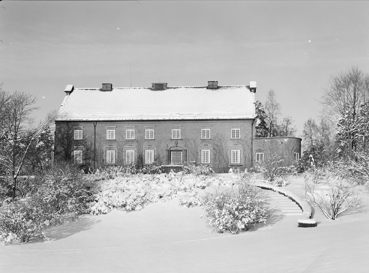 Munkebakken er en eiendom på Lysaker i Bærum. Hovedhuset ble tegnet av Arnstein Arneberg for Otto Nyquist og Gerda Nyquist (datter av Rasmus Meyer) i 1916.